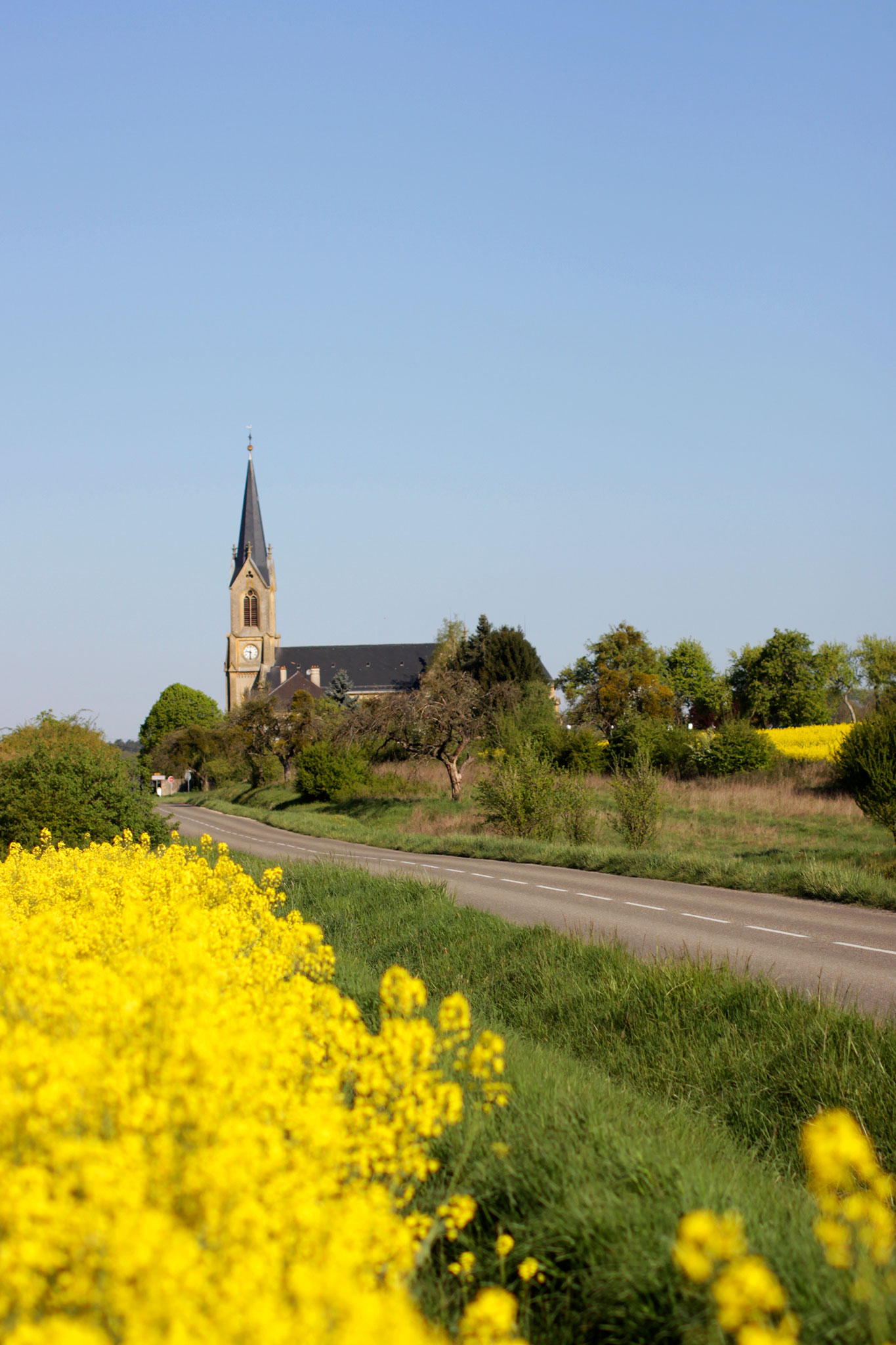 D956, Halstroff, Moselle, France